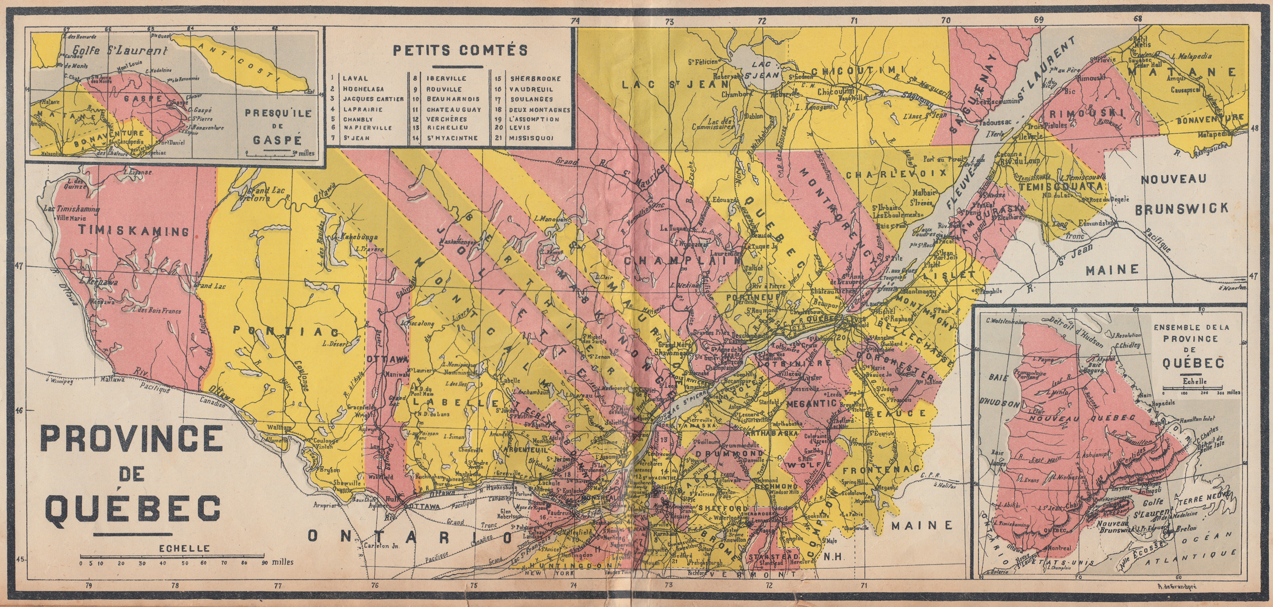 Carte électorale tirée de Géographie-Atlas, Cours Moyen. Montréal 1920.